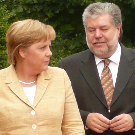 Angela Merkel, Kurt Beck. Eröffnung Arp Museum Bahnhof Rolandseck, 29. 09. 2007